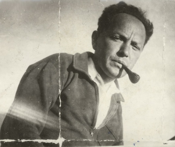 Vándor Sándor magyar zeneszerző.